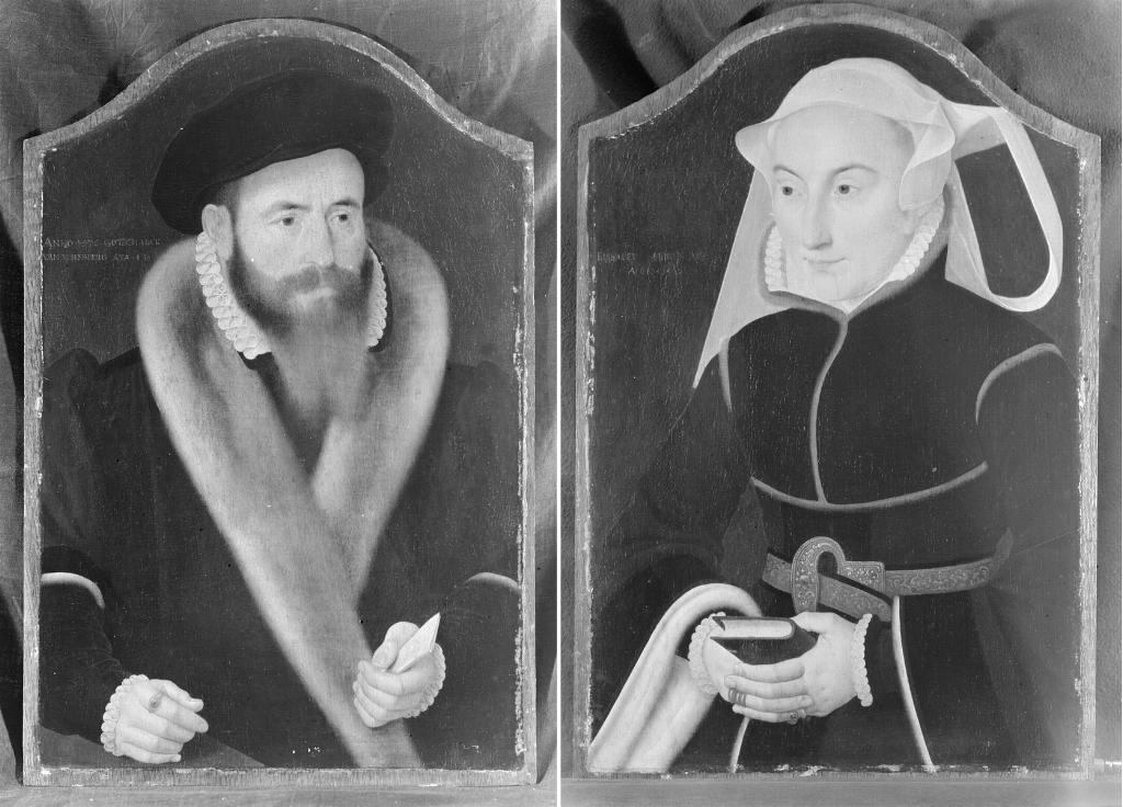 Gottschalk II. *1532 † 1597 & Elisabeth geb. Horn 1576 Bartholomäus Bruyn (der Jüngere), Maler